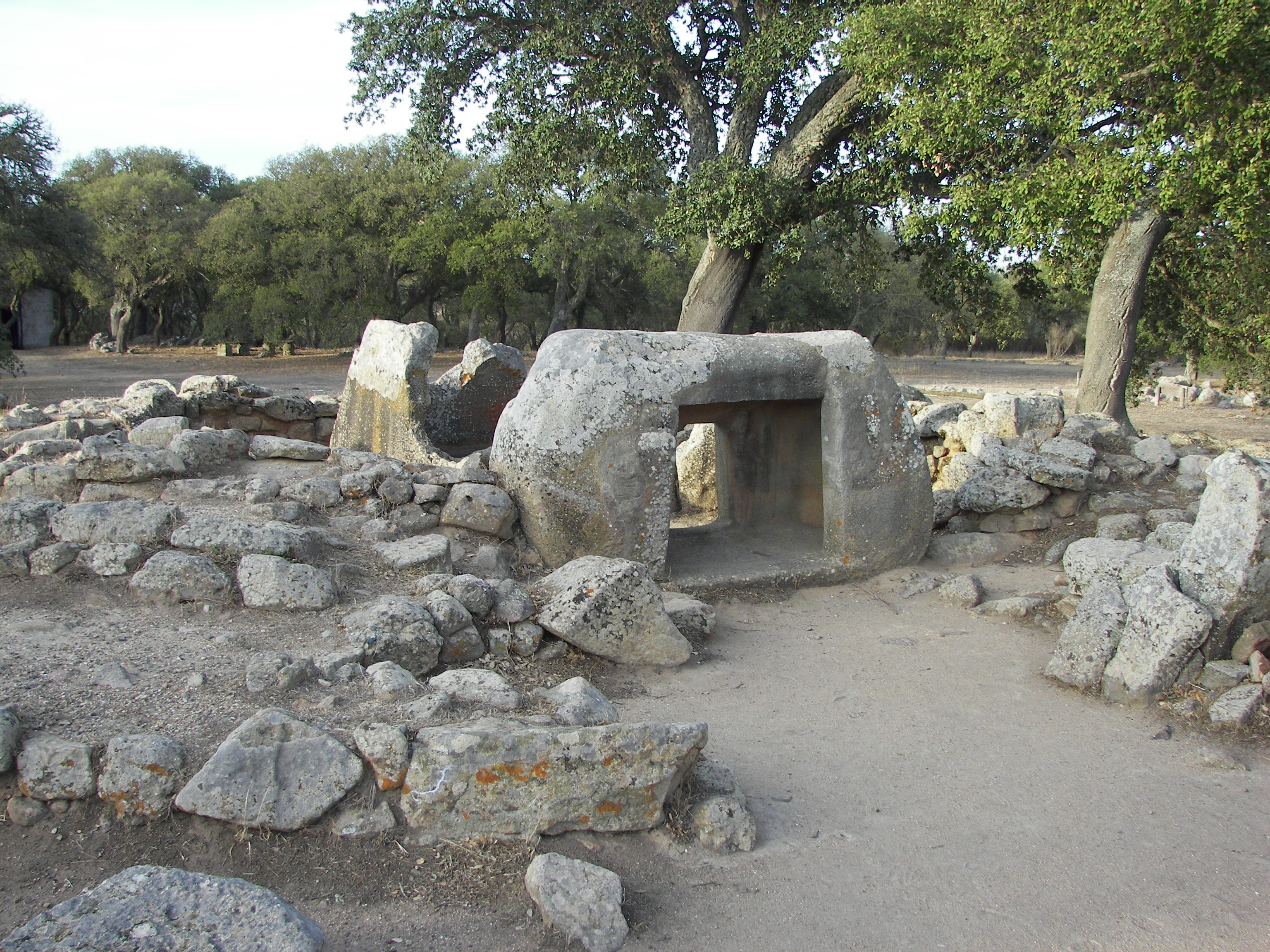 Goni - Parco archeologico Pranu Mattedu